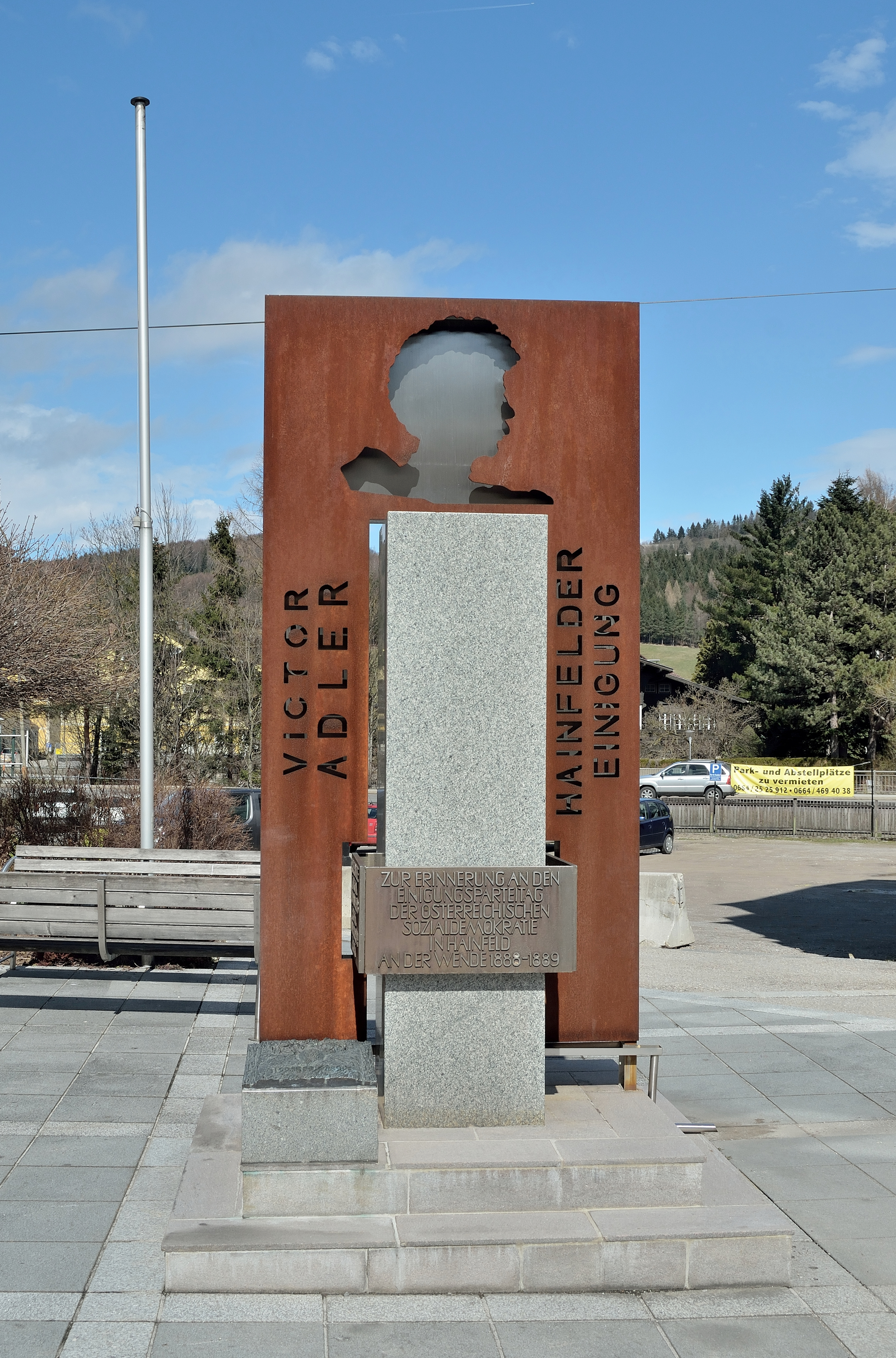 Das Monument am Victor-Adler-Platz in Hainfeld, Niederösterreich, erinnert an den Einigungsparteitag der österreichischen Sozialdemokratie von 30. Dezember 1888 bis zum 1. Jänner 1889 unter der Ägide von Victor Adler. Der Gedenkstein zur Erinnerung an die Gründung wurde ursprünglich zur 40-Jahr-Feier im Dezember 1928 enthüllt. Im Jahre 1934 wurde er nach dem Bürgerkrieg des Februar 1934 durch die Heimwehr zerstört. 1948 wurde ein neues Denkmal geschaffen und in der Hauptstraße aufgestellt.